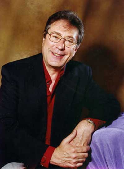 Fotografía hecha en su casa